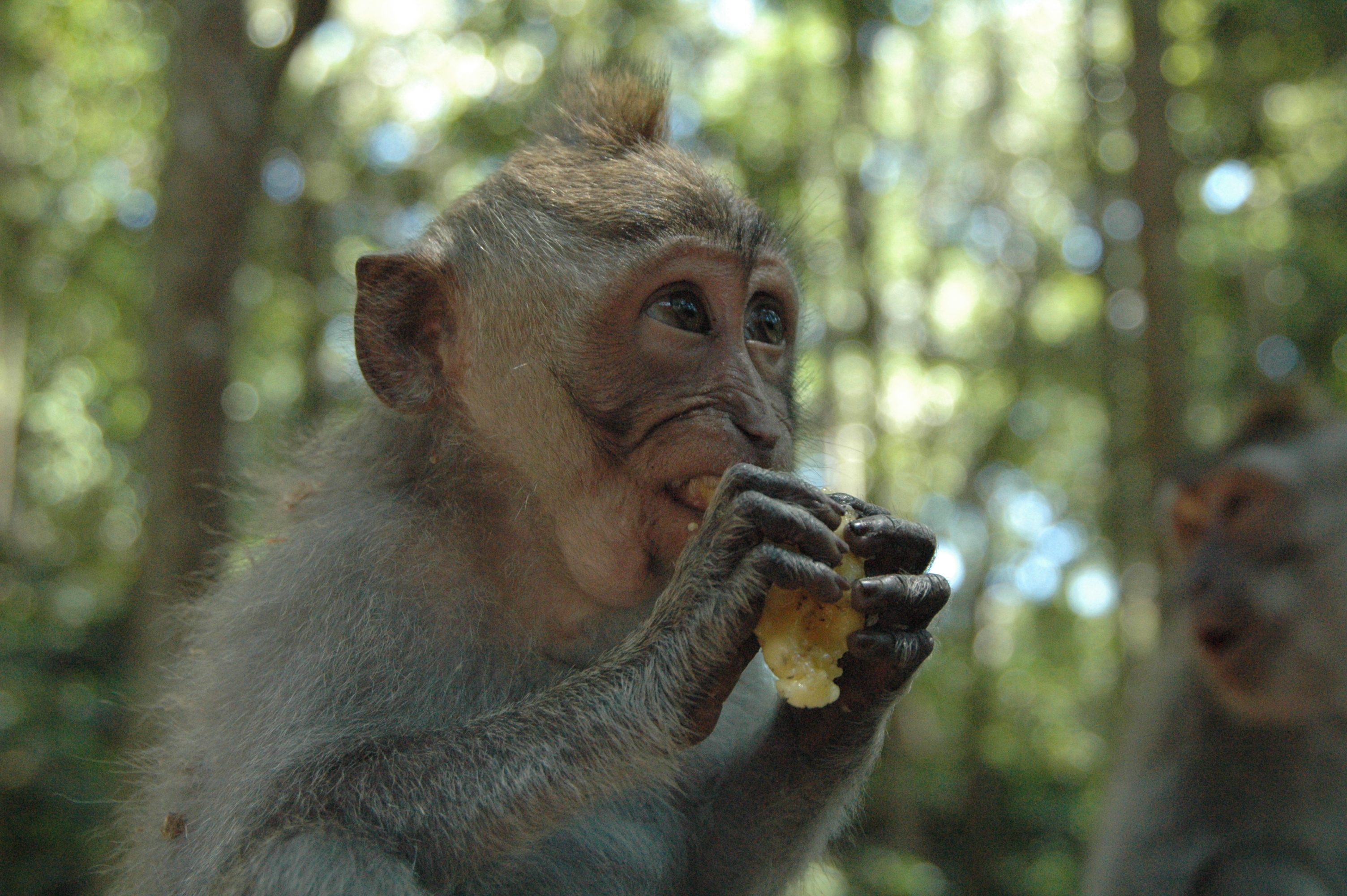 Long-tailed Macaque (Macaca fascicularis)